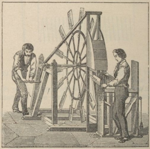 Teiilleuse, dite également moulin flamand ou écangeuse, machine à teiller le lin